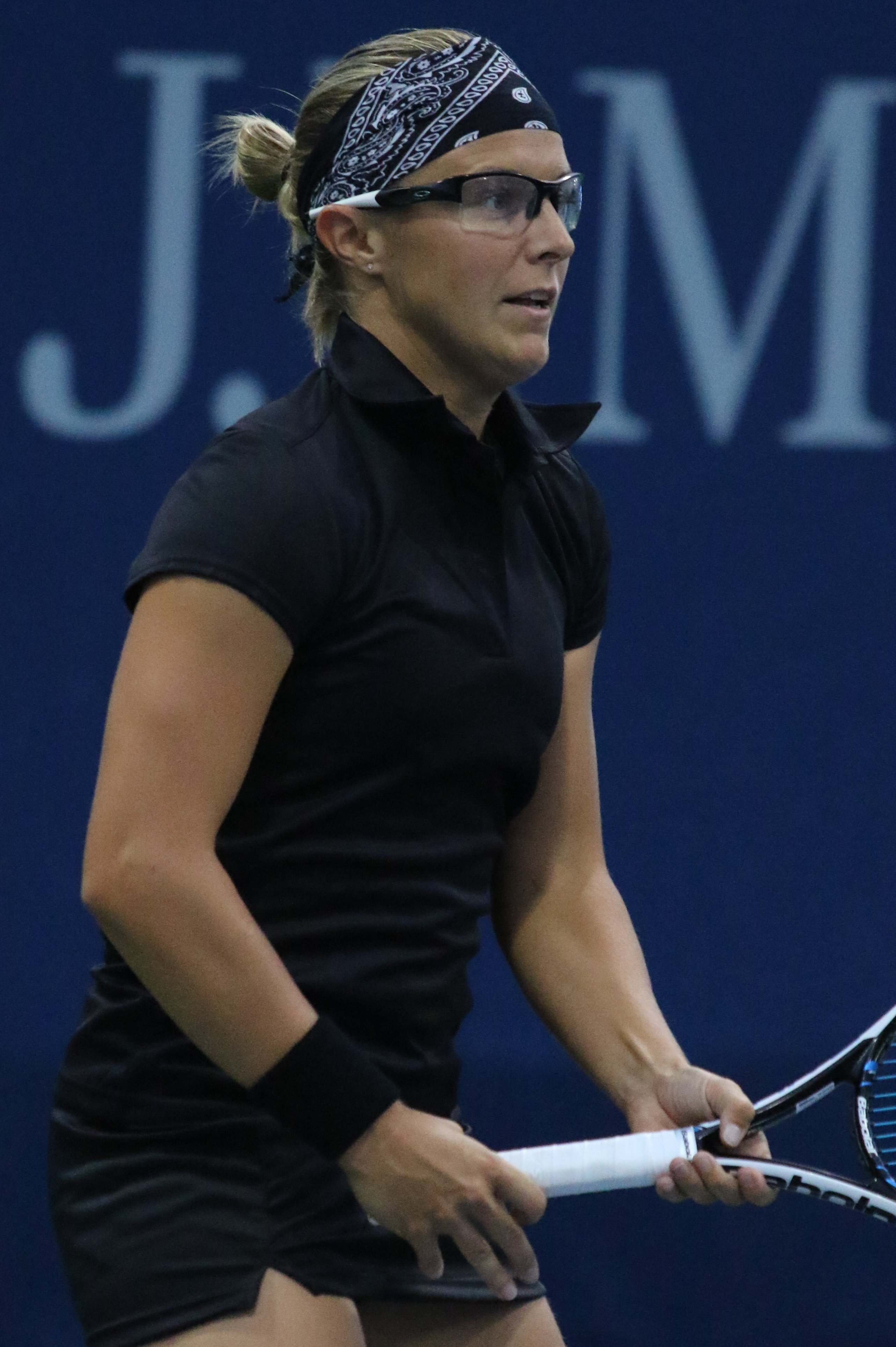 Flipkens US16 (5)